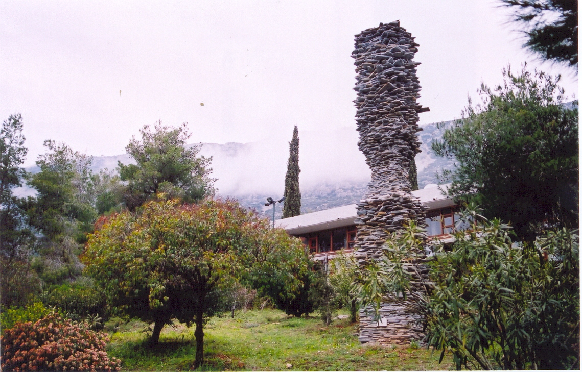 Πάρκο Γλυπτικής - "Ατέρμονη Κολώνα" του Κώστα Βαρώτσου